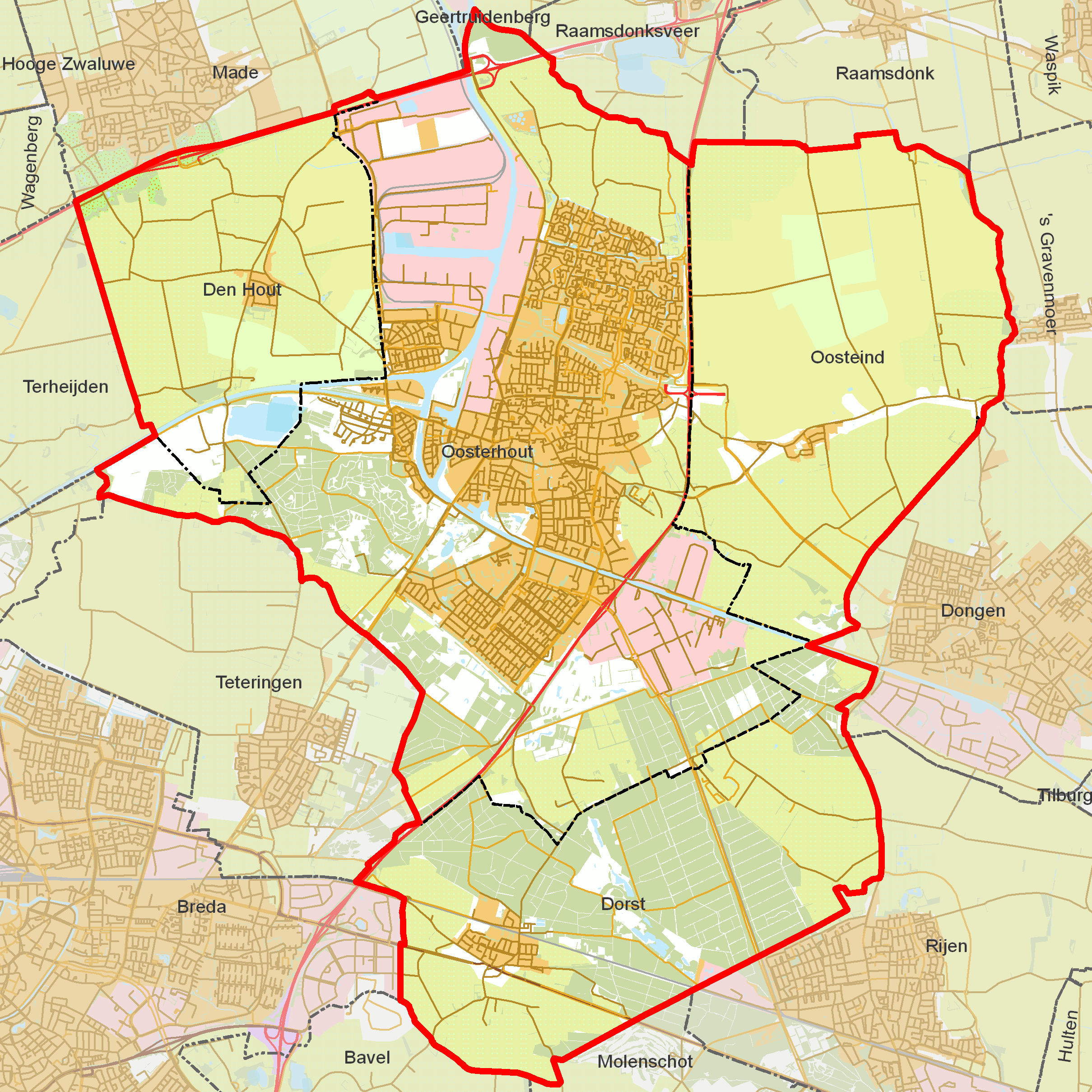 BAG woonplaatsen - Gemeente Oosterhout.png